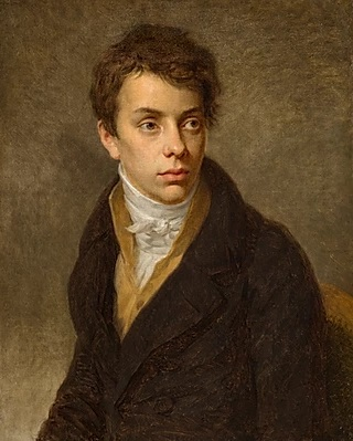 Portrait de Joseph Coiny [à l'âge de 17 ans], huile sur toile (61 x 49.5 cm).